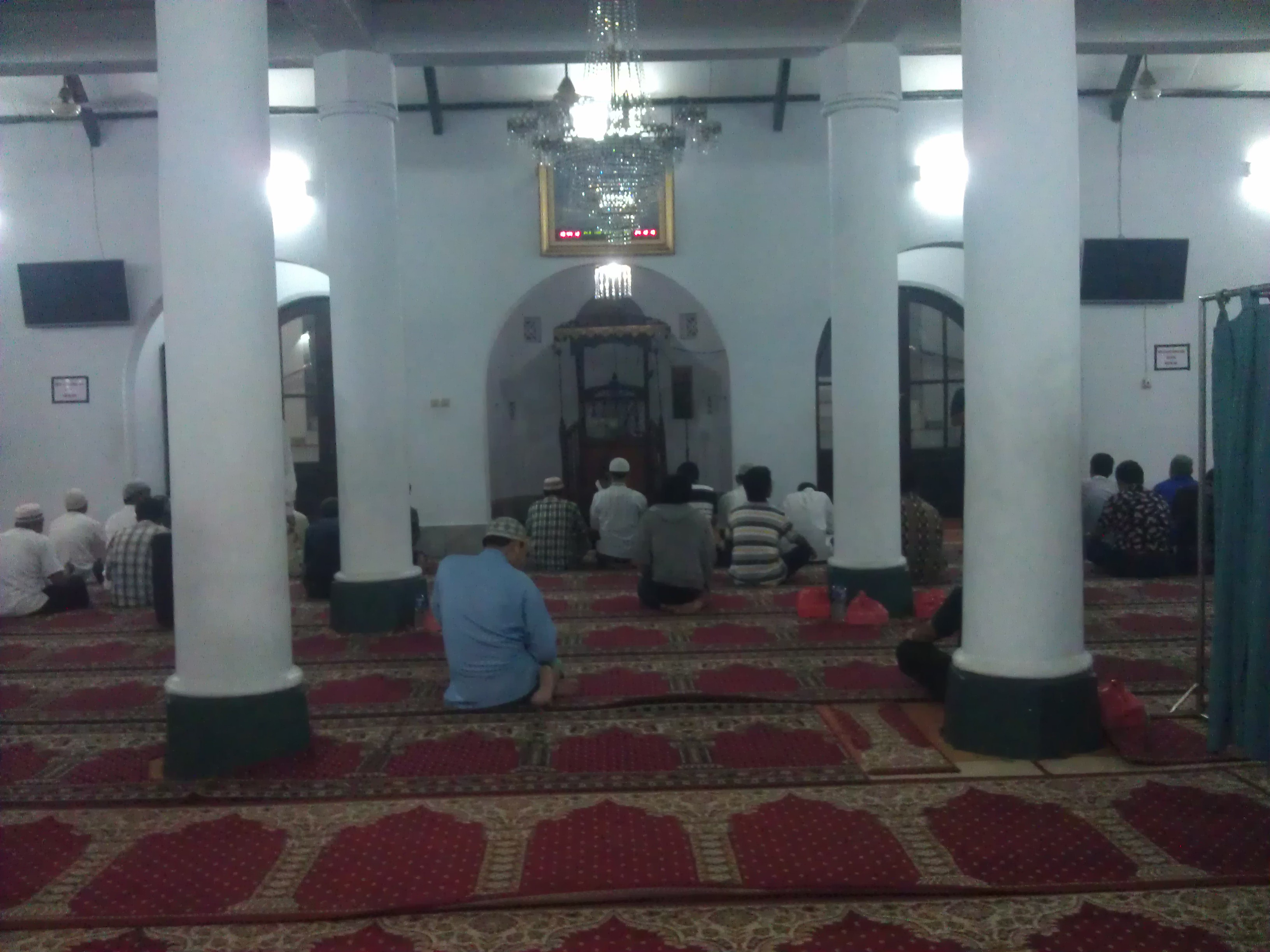 Bagian dalam Masjid Jami' Al-Makmur